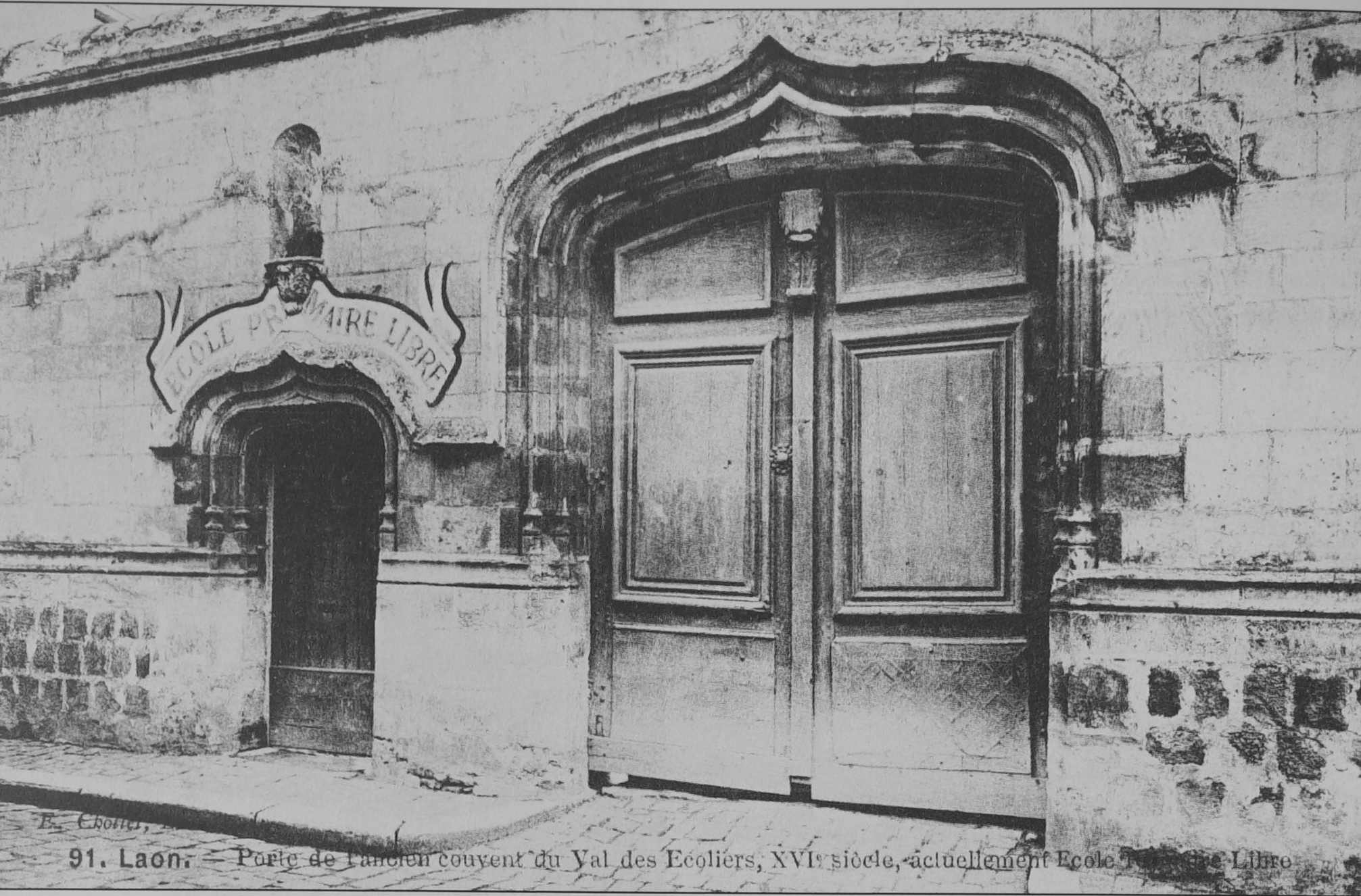 sur une Cartes postales de Laon.